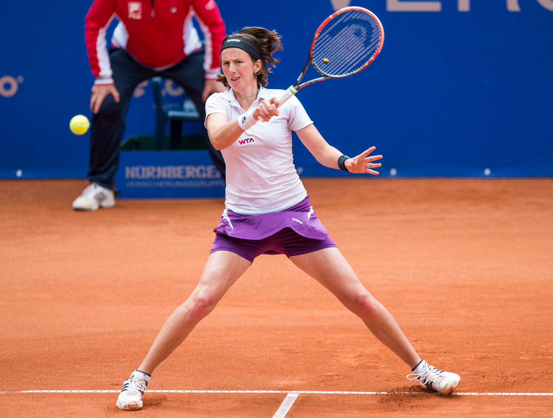 Damentennis,Kristina Barrois,Nürnberger Versicherungscup 2014,Tennis,WTA